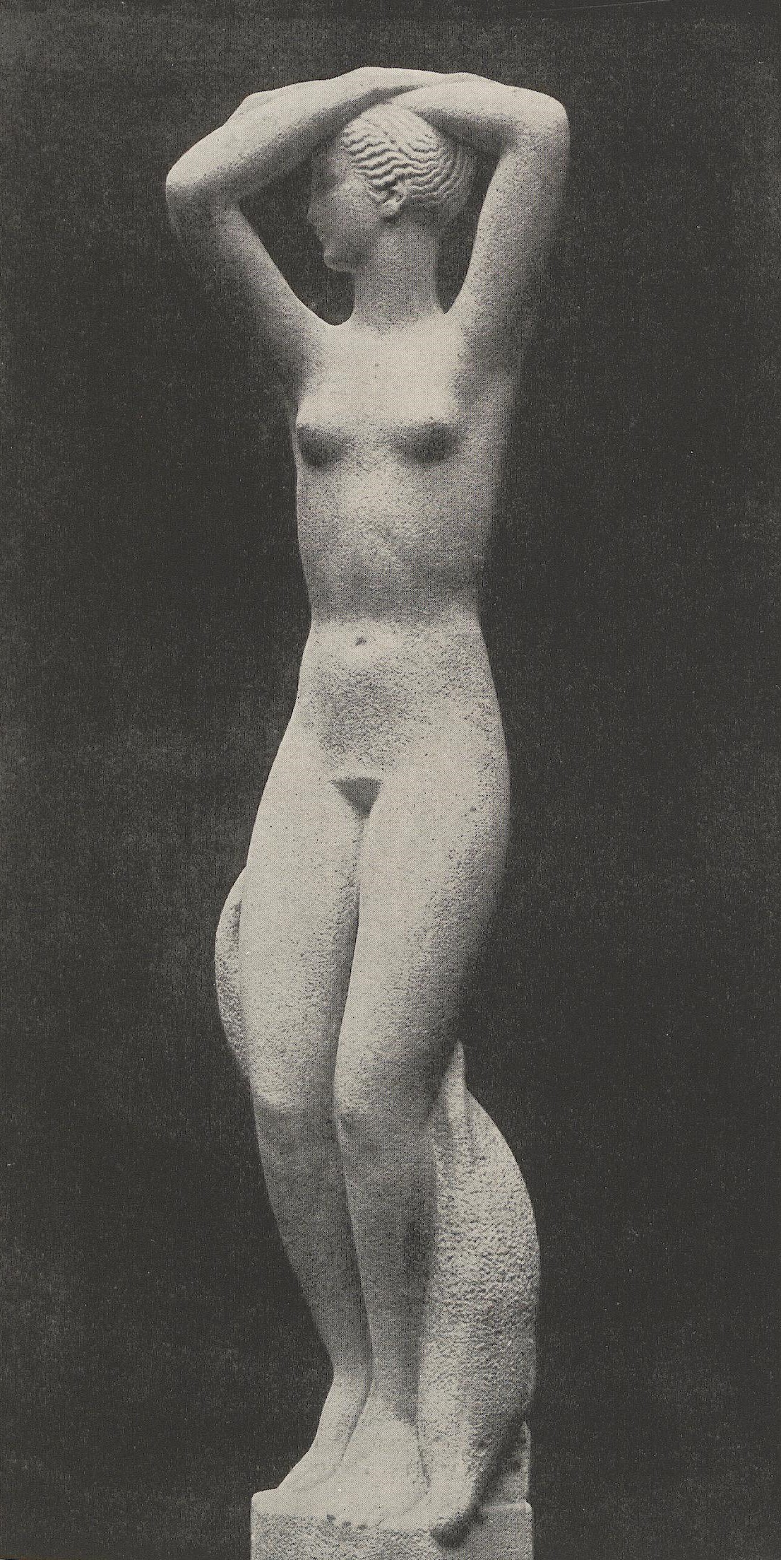 Professor Richard Luksch - Elbin. Weißer Granit